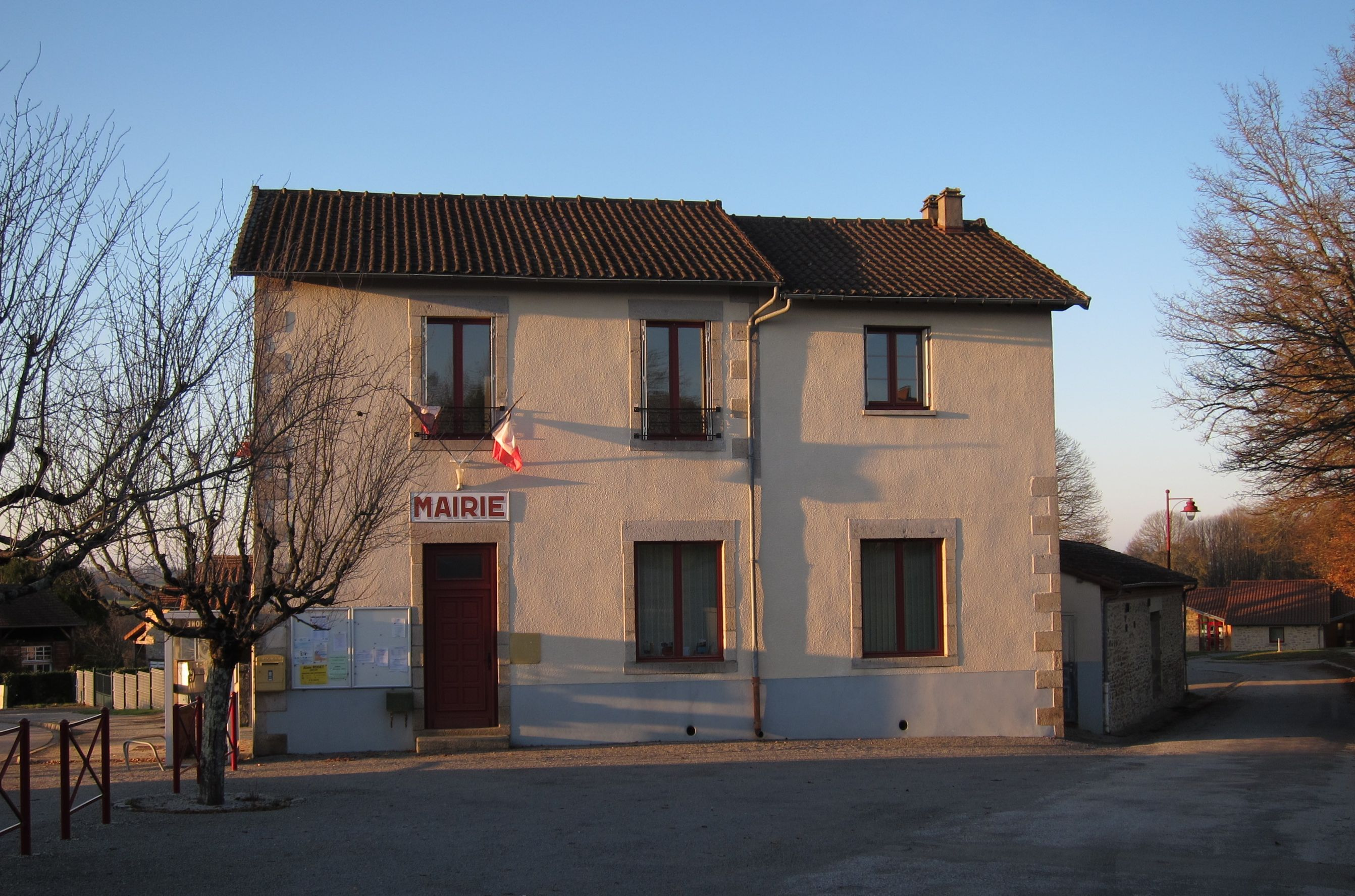 Mairie d'Eybouleuf, Haute-Vienne, Limousin, France.